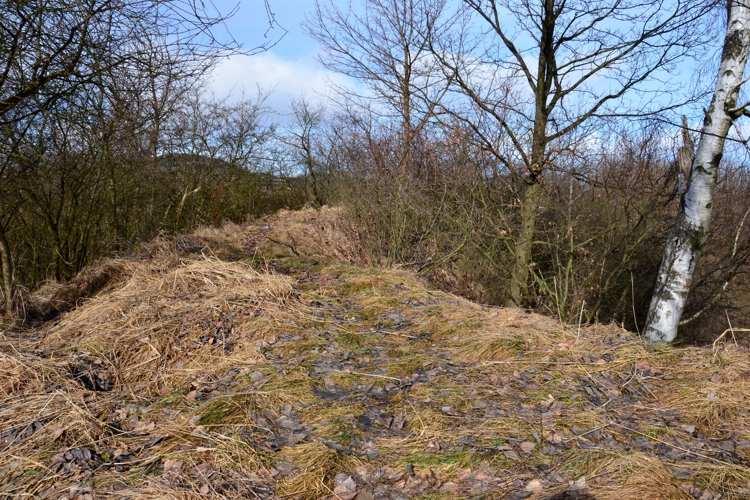 Koruna valu v severozápadní části hradu